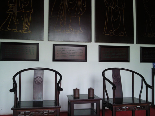 石鼓书院讲堂，位于大观楼一楼。